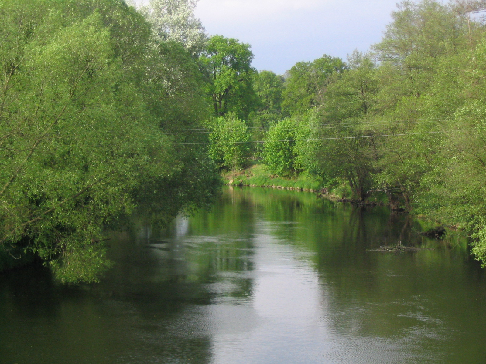 River Jizera, Czech Republic